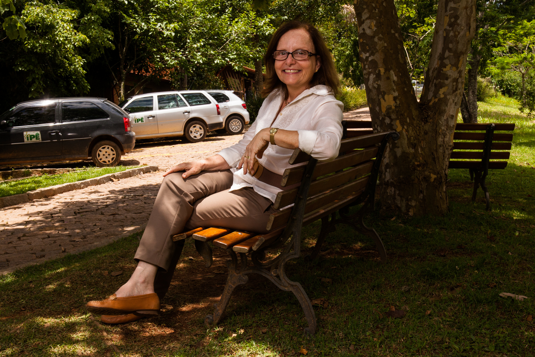 Suzana Machado Padua - presidente do IPE - Instituto de Pesquisas Ecológicas. Foto: Claudio Rossi